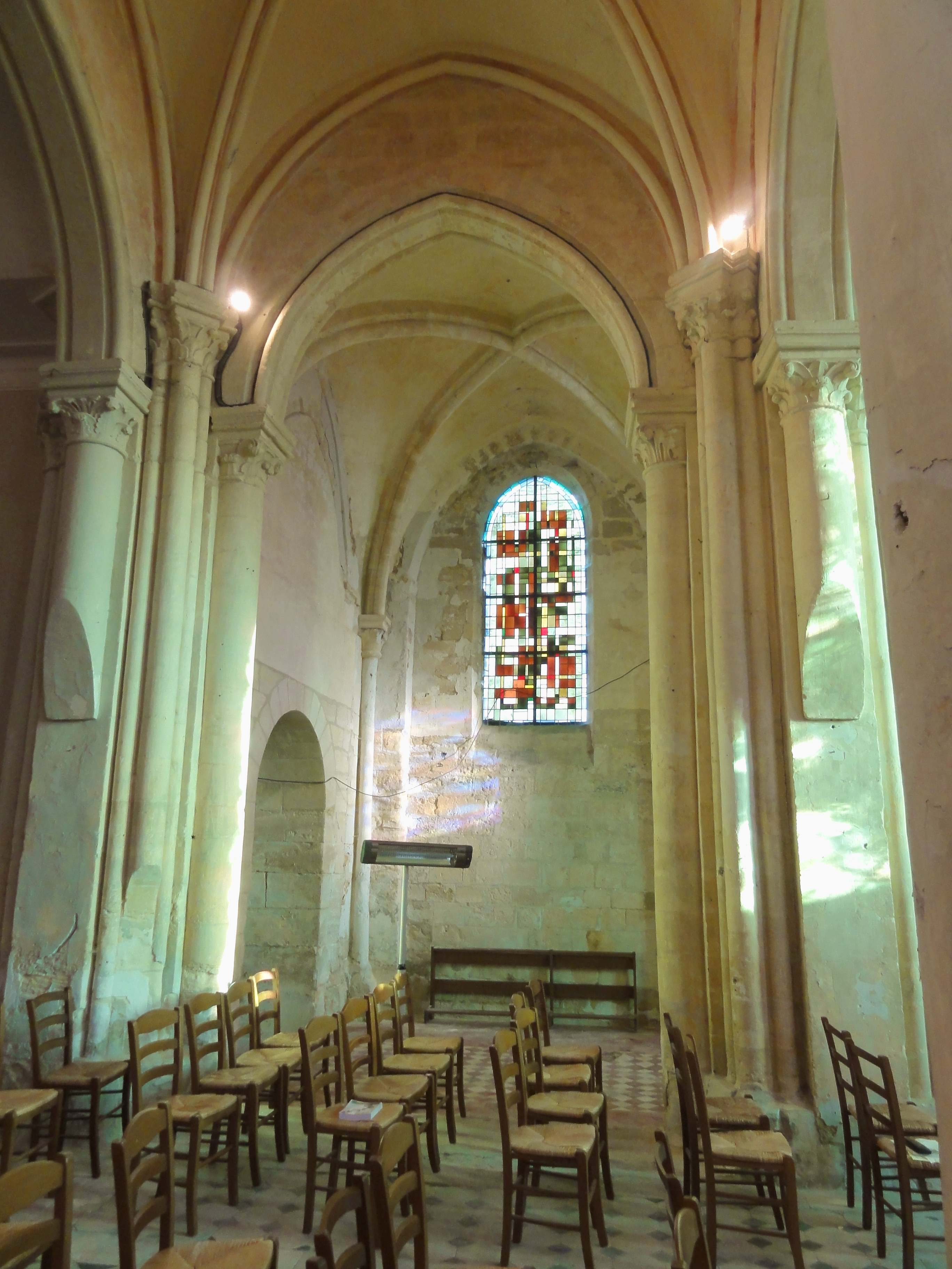 Intérieur de l'église - voir titre.